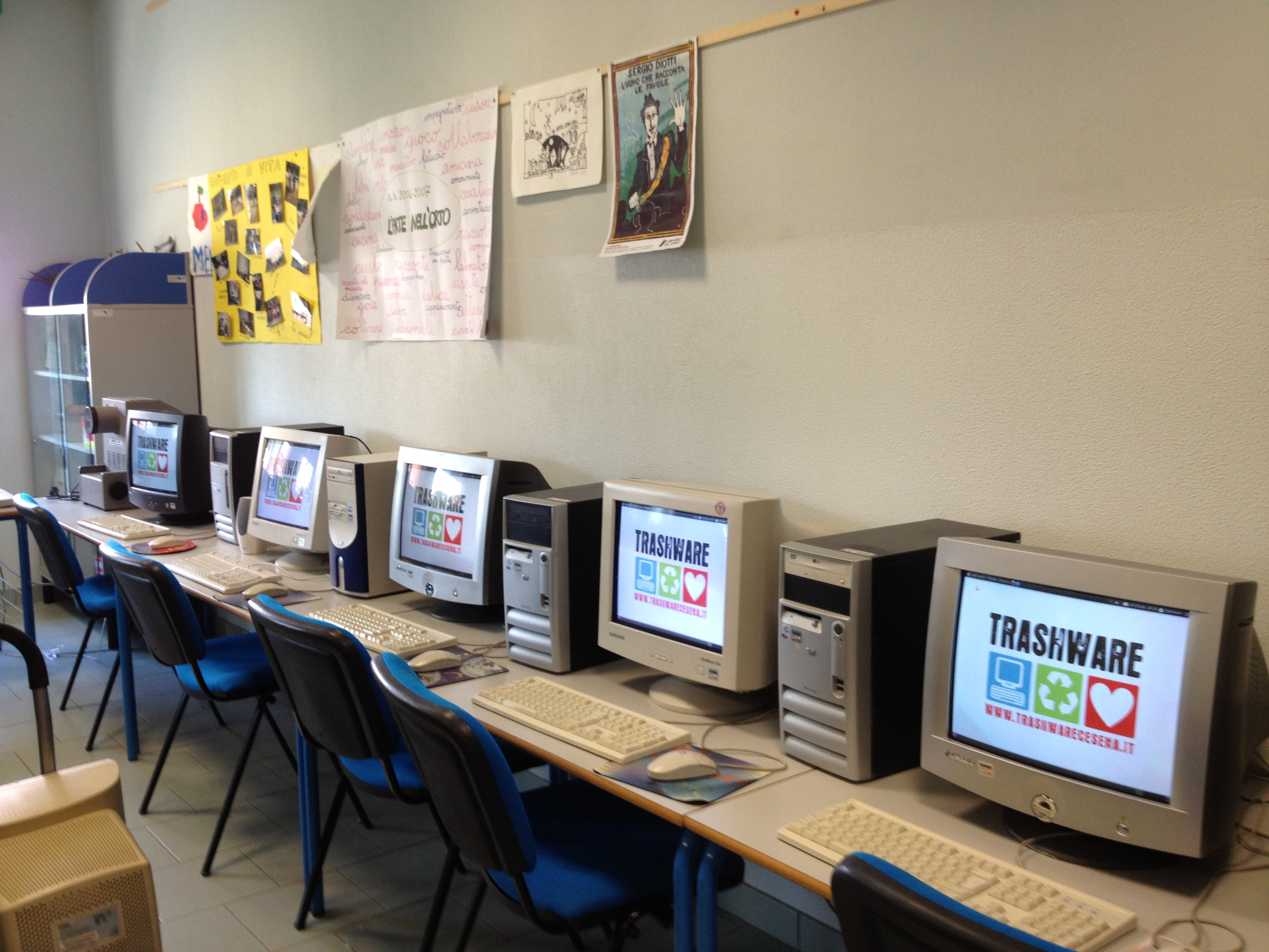 Laboratorio donato dal progetto Trashware Cesena